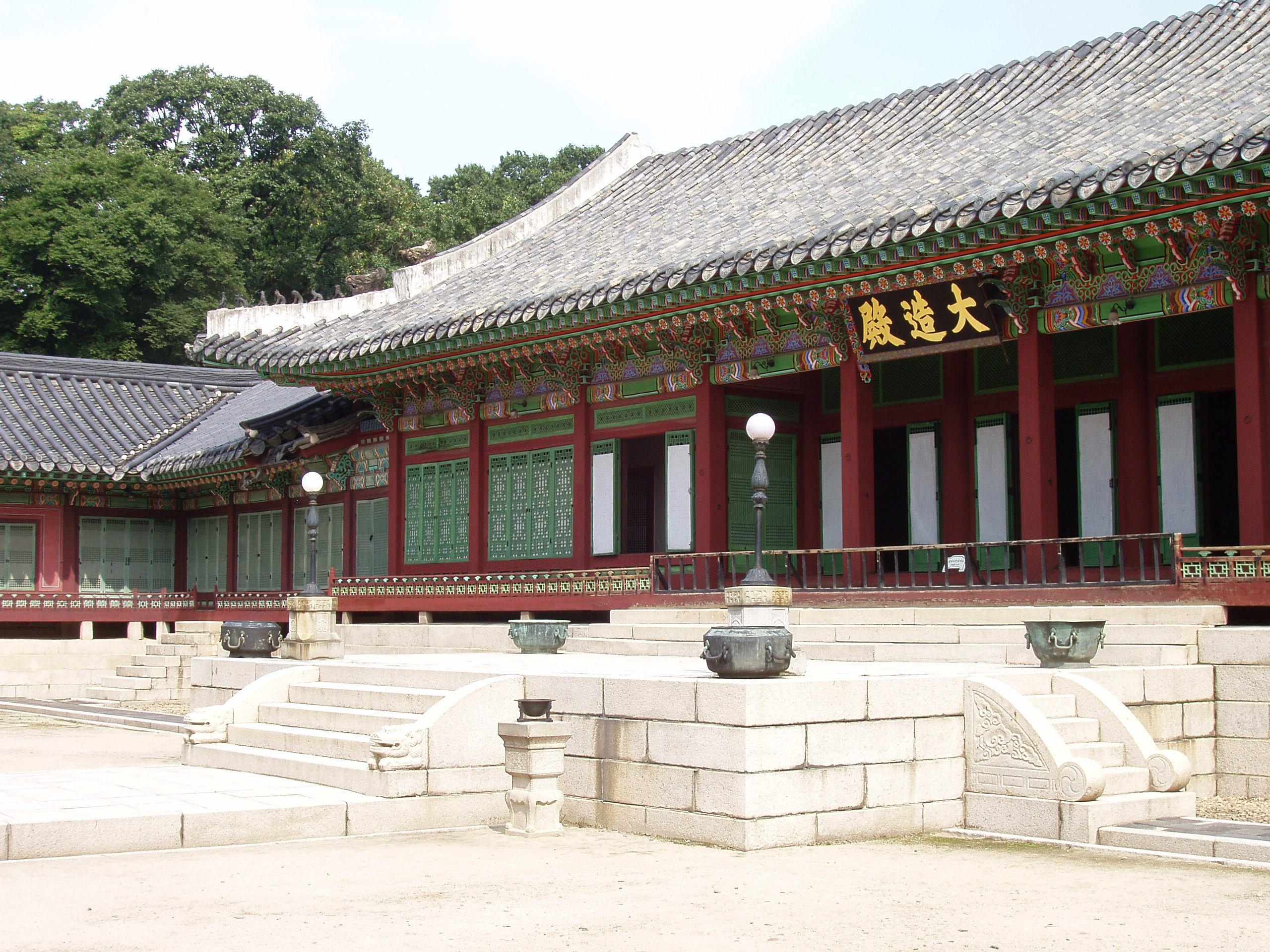 Daejojeon, Changdeokgung - Seoul, Korea.